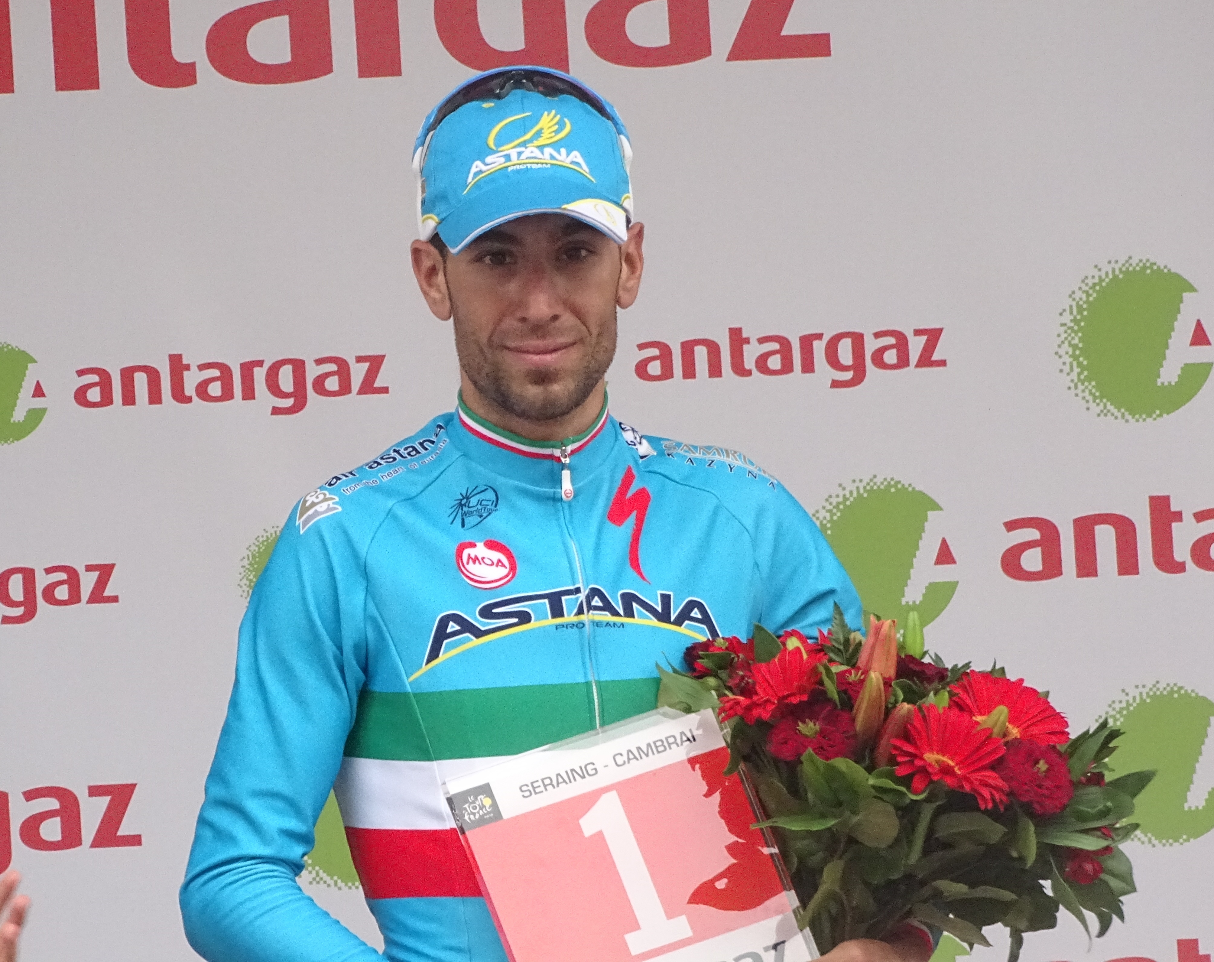 Reportage réalisé le mardi 7 juillet à l'occasion de l'arrivée de la quatrième étape du Tour de France 2015 à Cambrai, Nord-Pas-de-Calais, France.